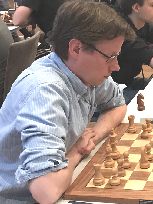 Jan Werle, Runde 9 der Grenke Chess Open 2019 in Karlsruhe.